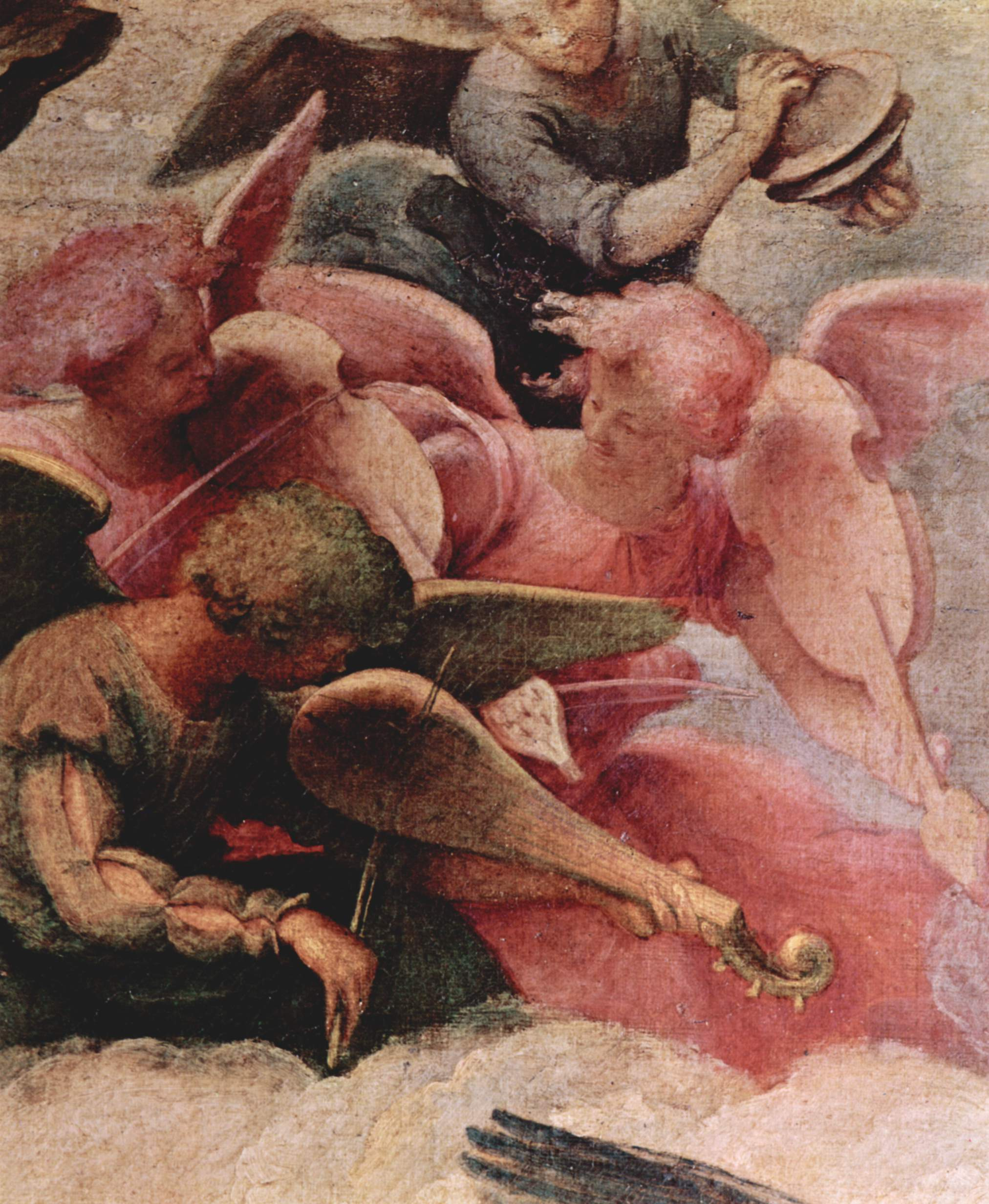 detail: Musizierende Engel (oben links)